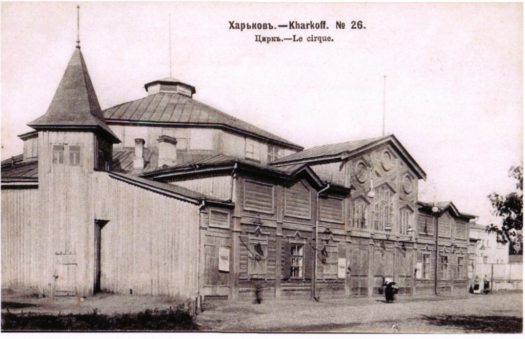 Цирк братьев Никитиных на ул.Екатеринославской, 80-е гг. XIX в..Харьков (не сохранился)